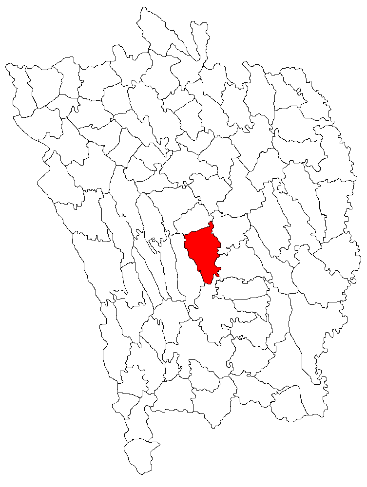 Categorie:Hărţi ale judeţului Vaslui